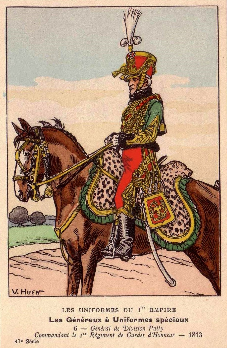 Charles Joseph Randon de Pully, général de division et commandant le 1er régiment de gardes d'honneur.